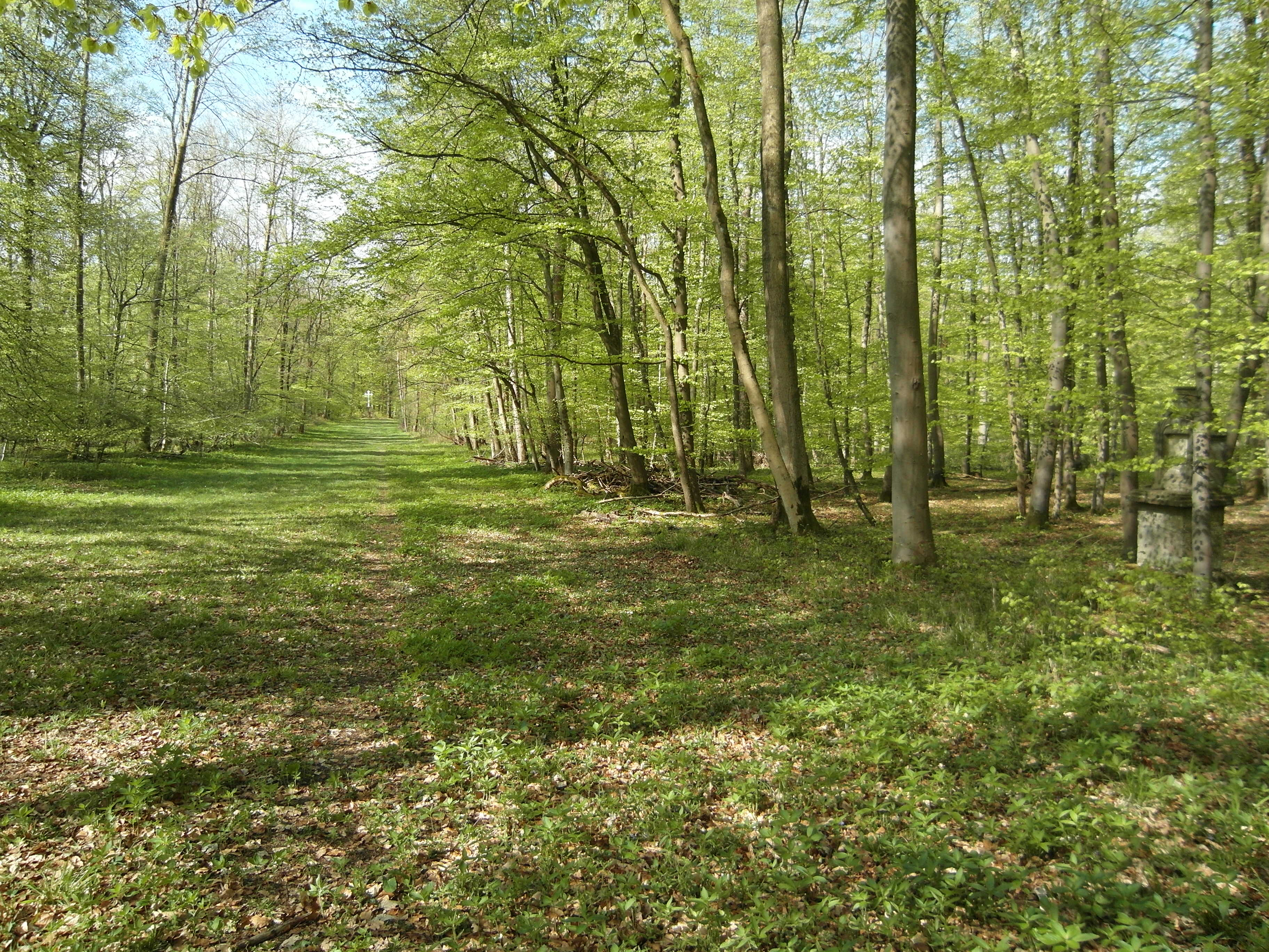 Dieses Foto zeigt die letzten Kreuzwegstationen im westlichen Außenbereich von Bökendorf. This is a photograph of an architectural monument.